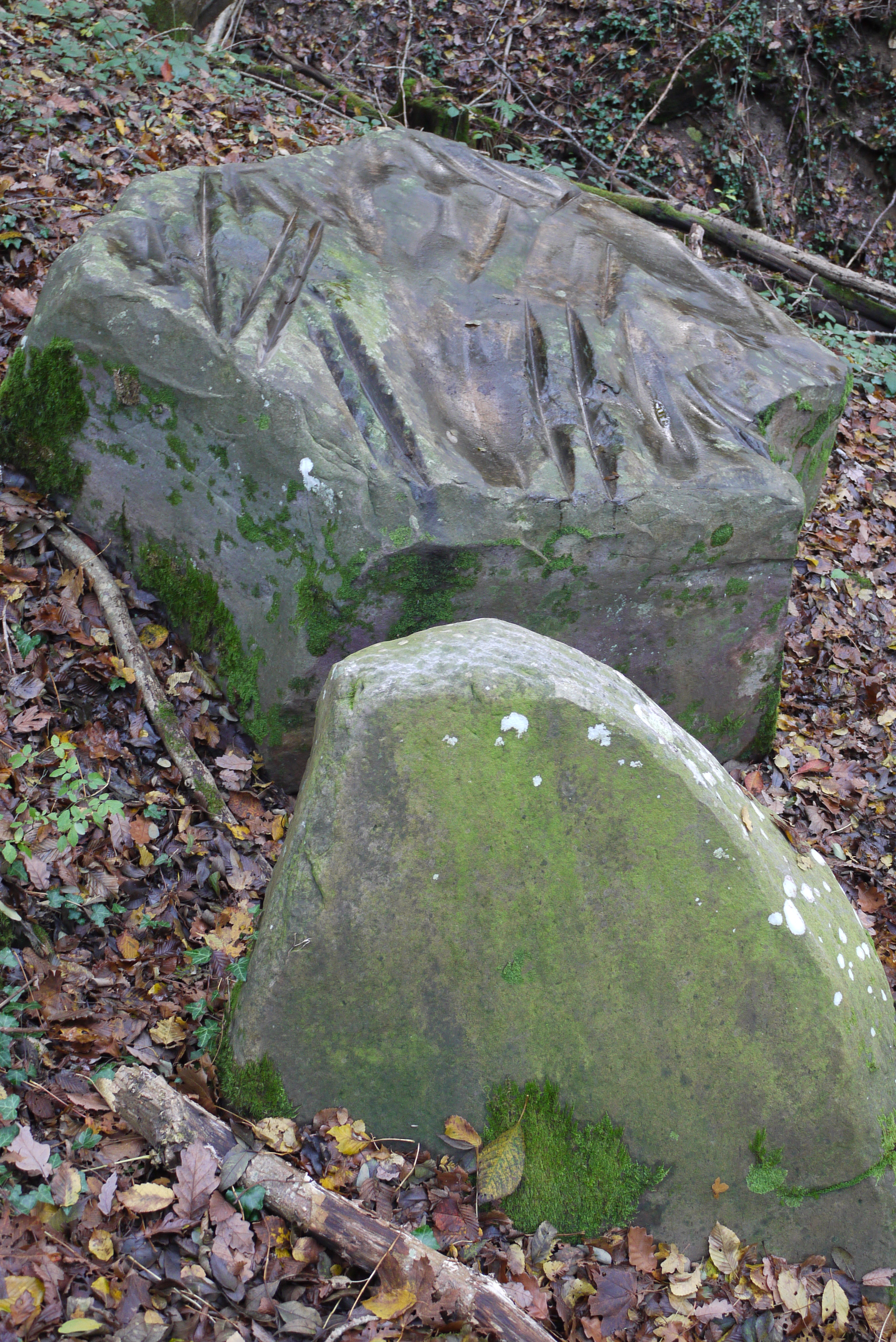 Le polissoir de Mezy-Moulins